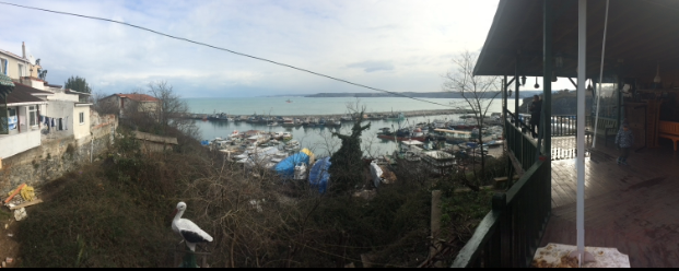 Rumeli feneri ve Karadeniz